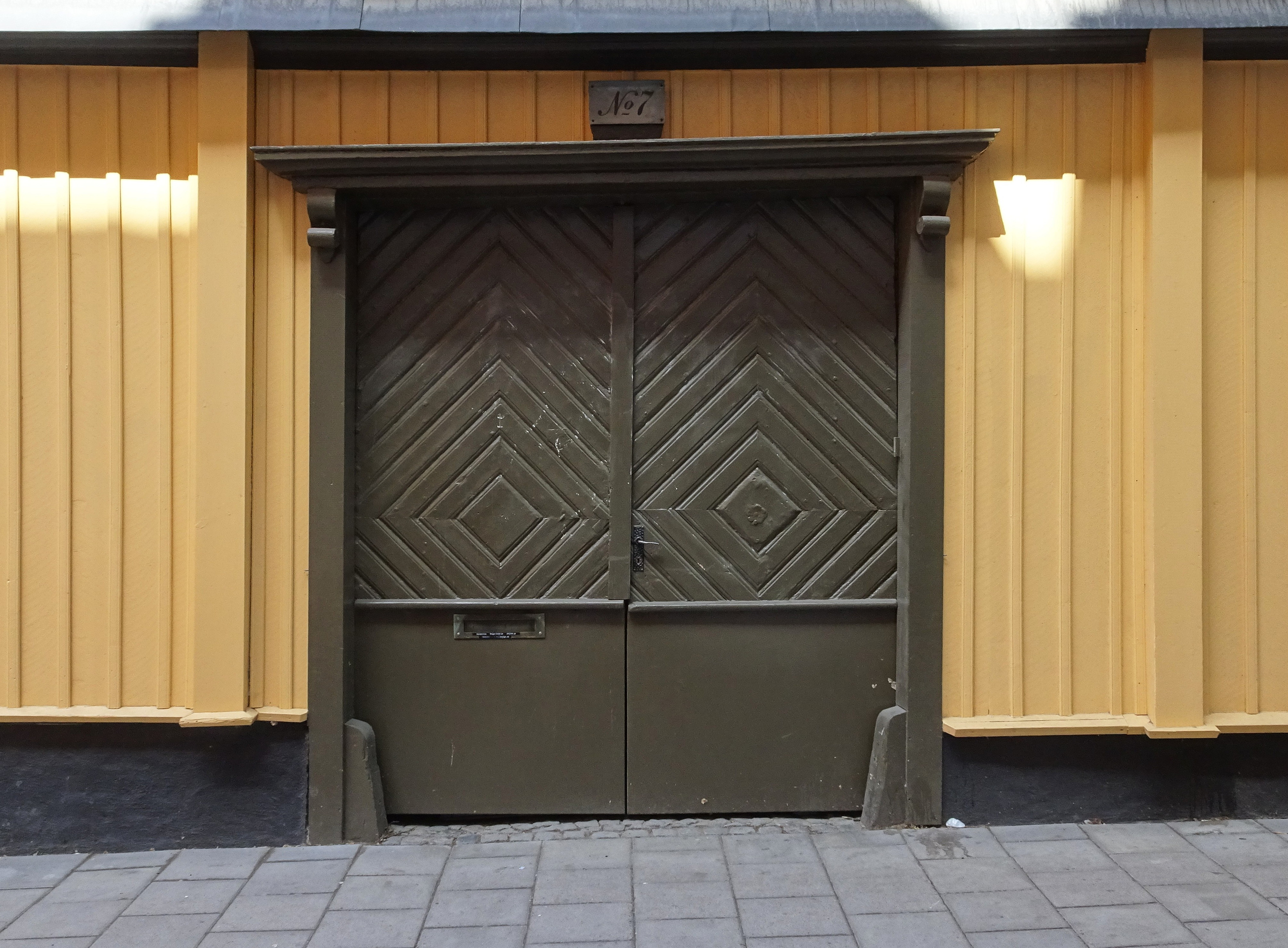 Tjärhovsgatan nr 7